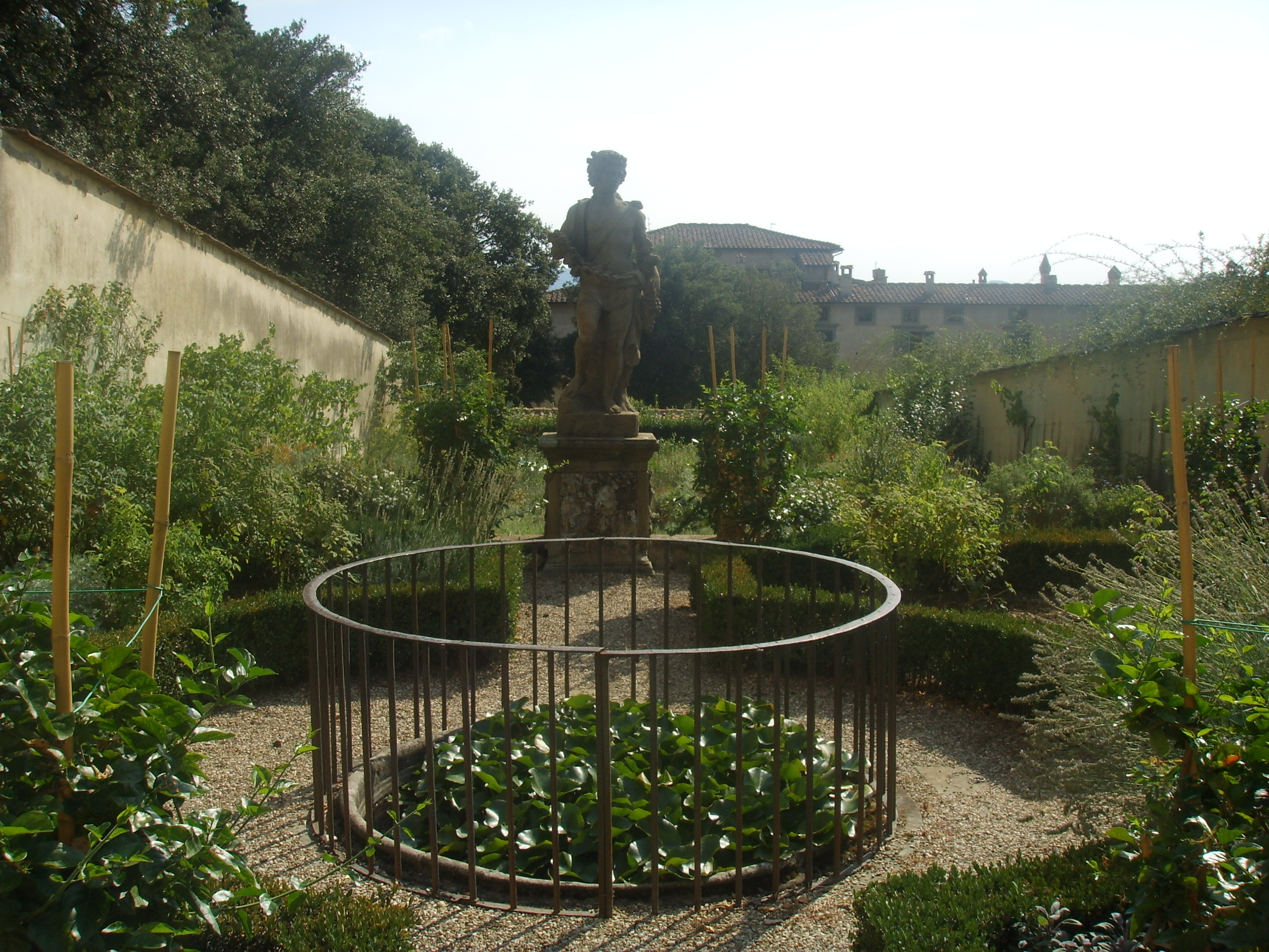 Parco di Villa Reale di Castello (Villa di Castello) Secret garden (Orto segreto) in Florence Italy